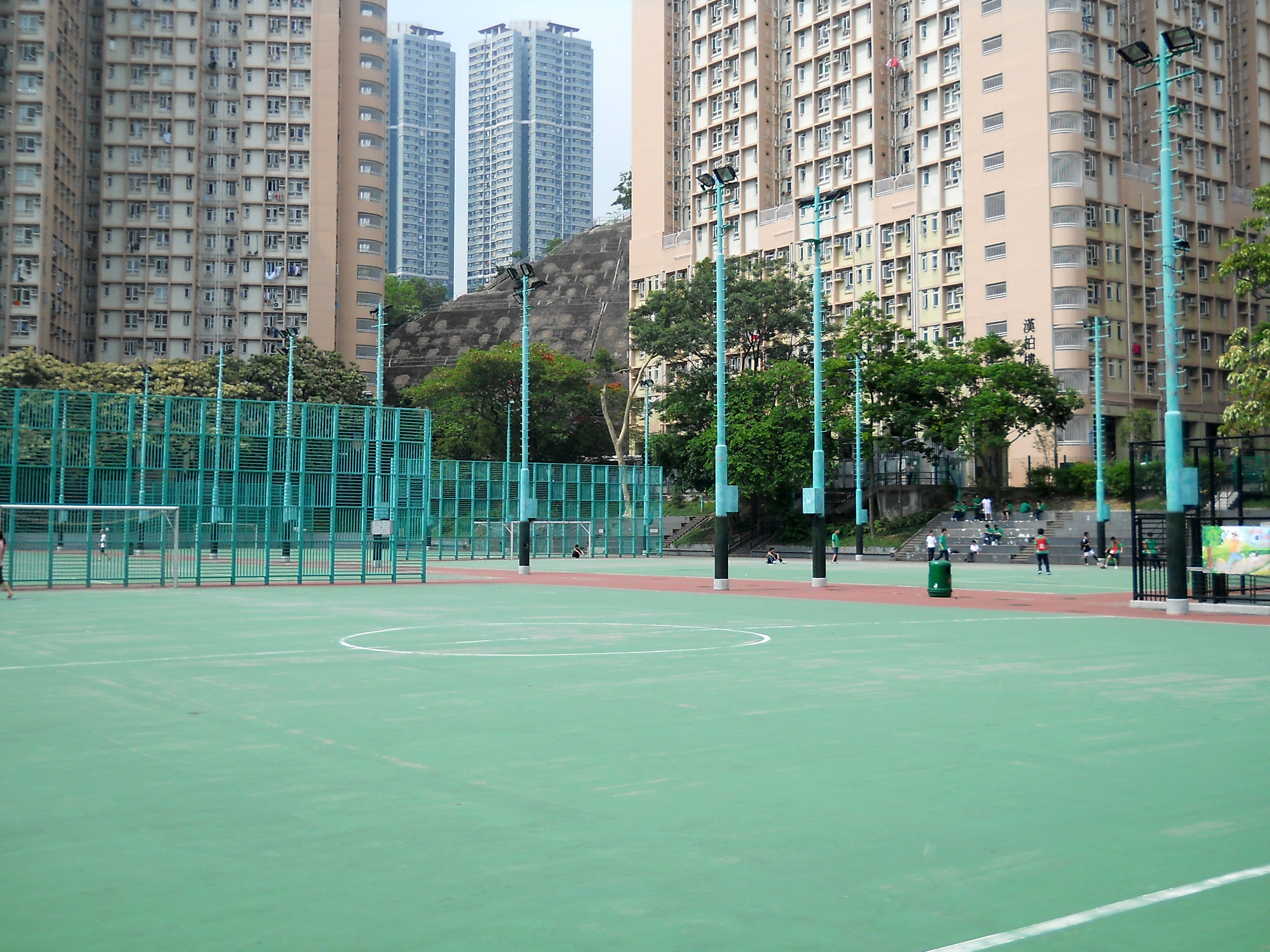 中文（香港）: 康寧道遊樂場